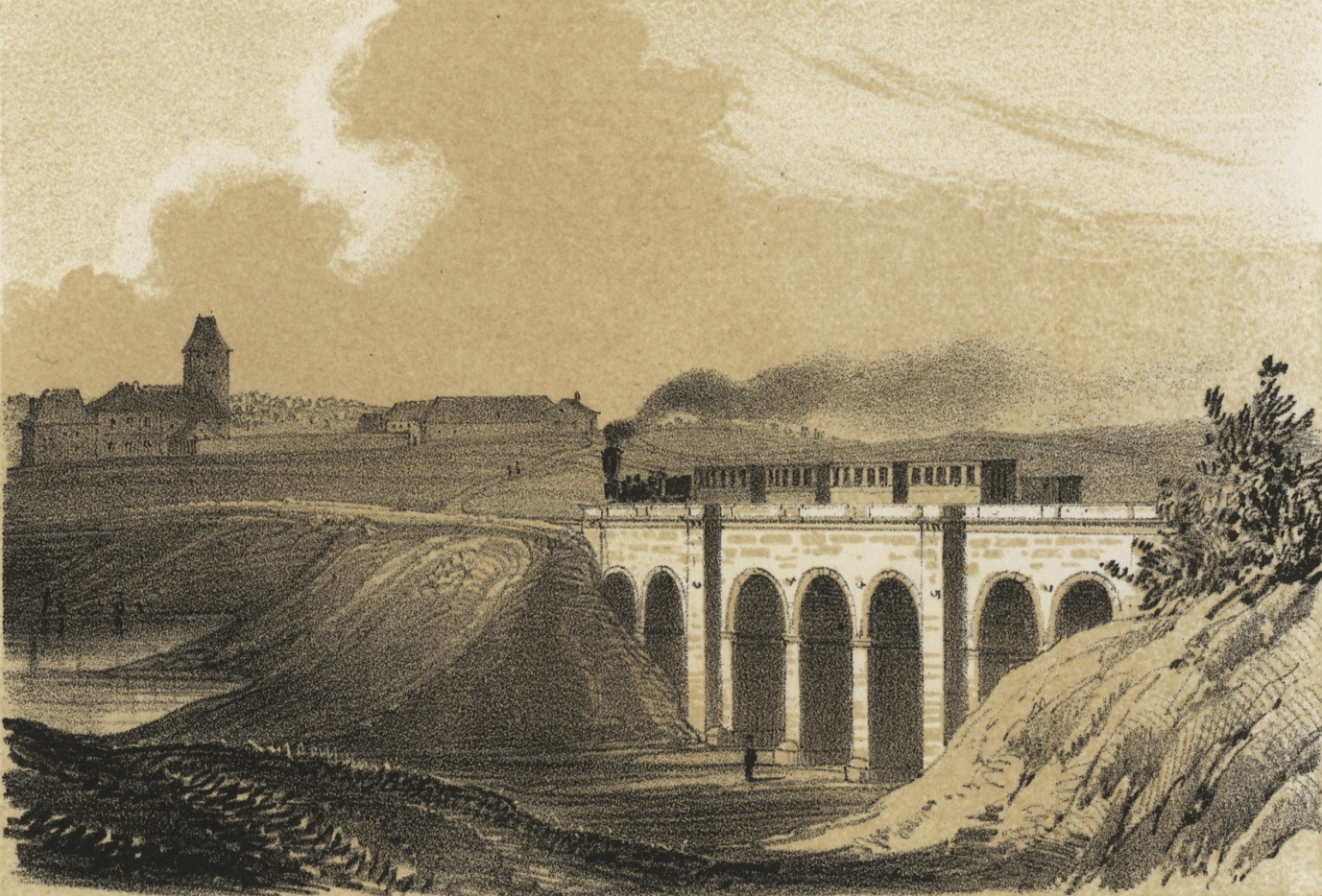 Kyje (viadukt)